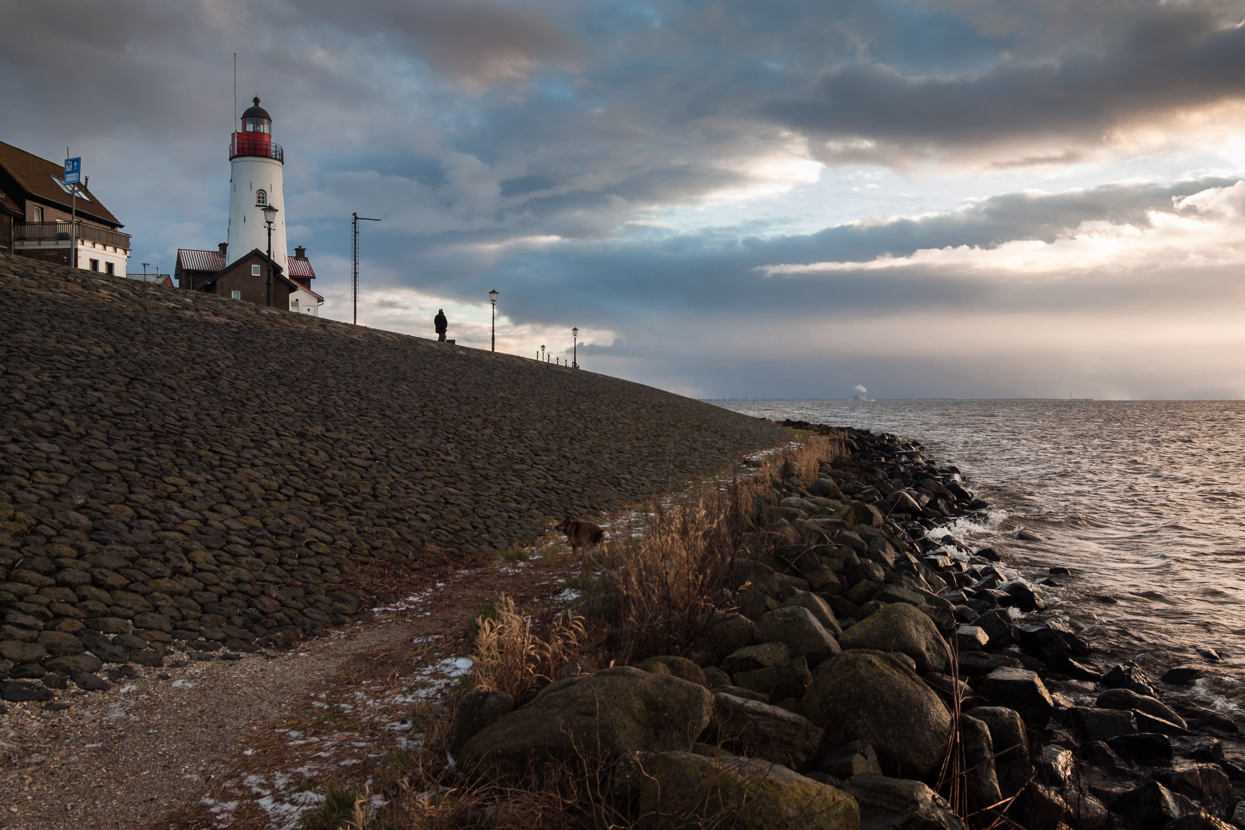 De Urker vuurtoren